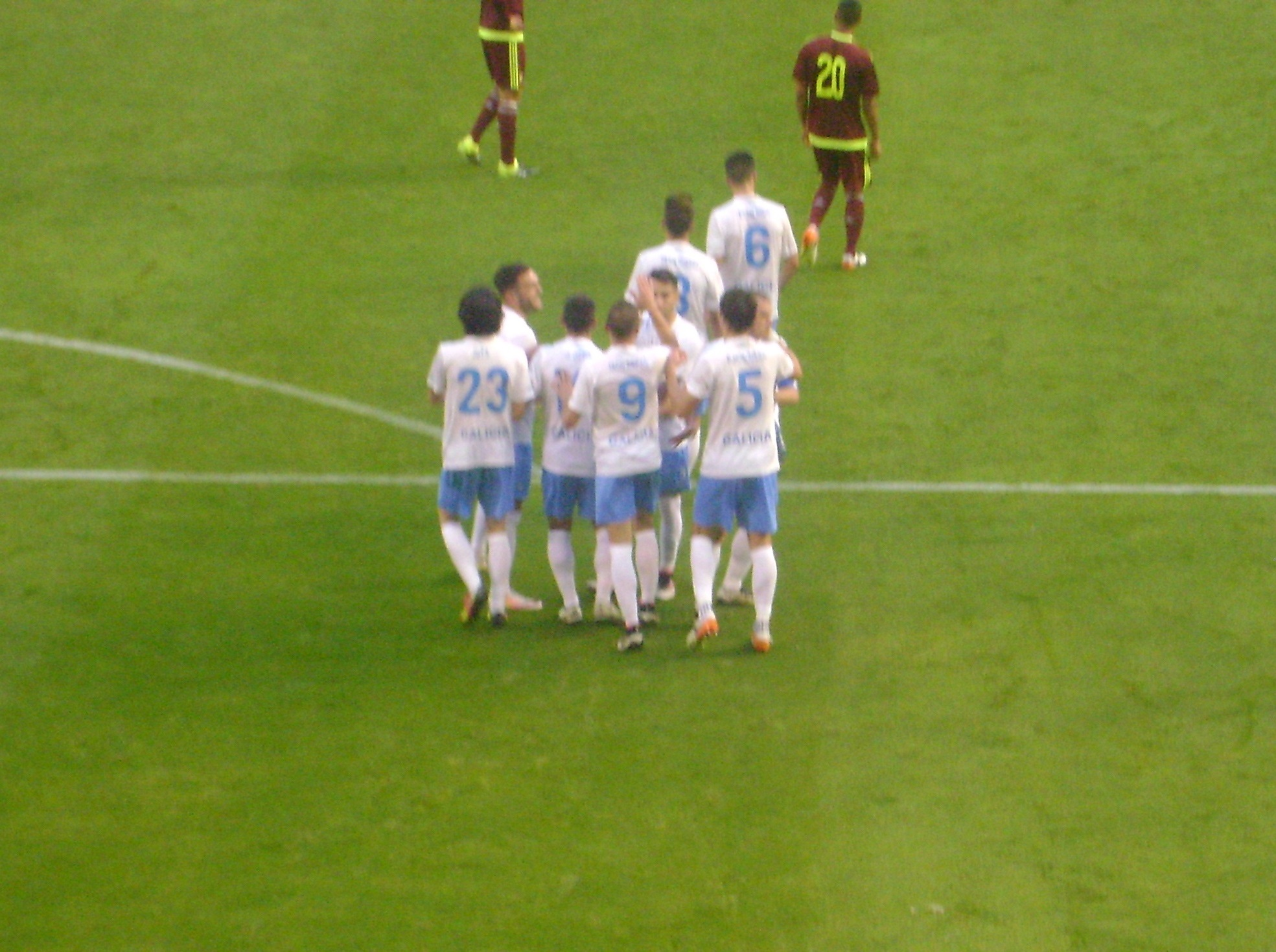 Xogadores da Selección Galega.